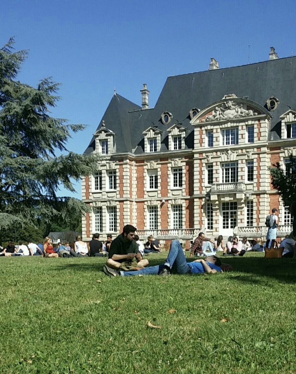 Le château du campus de Neoma à Rouen